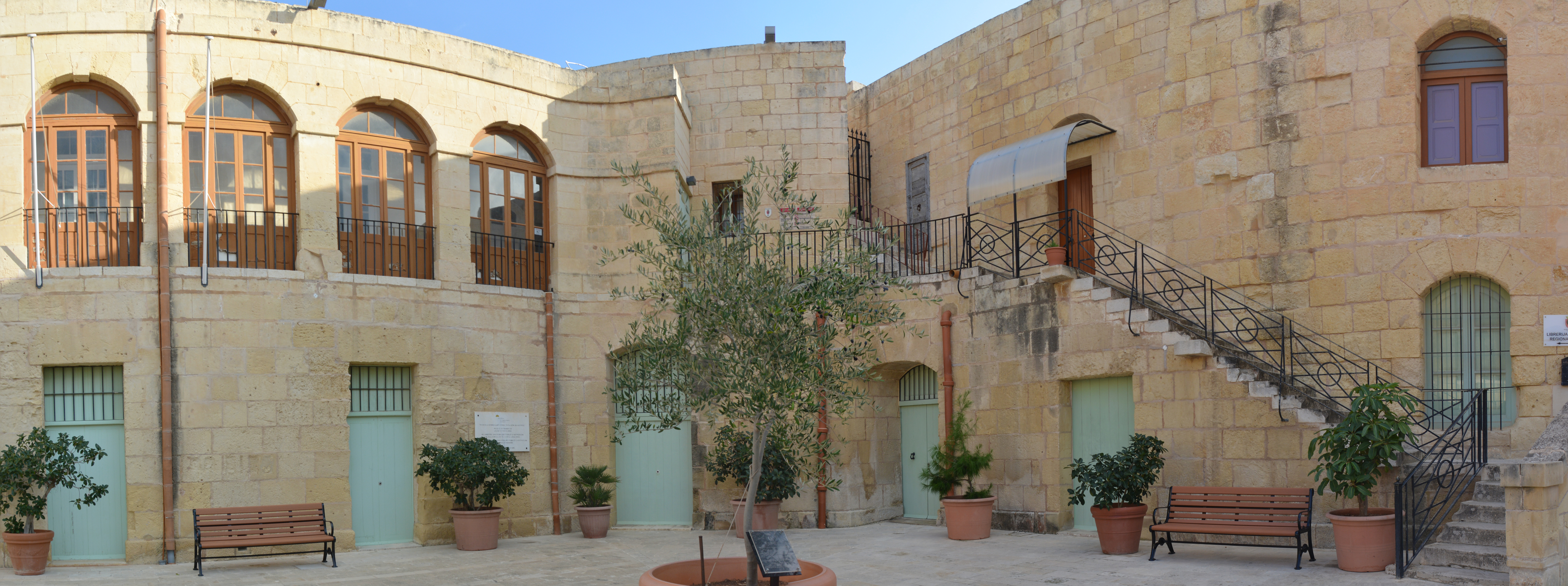 entrée du "Malta at War Museum", Birgu, Malte